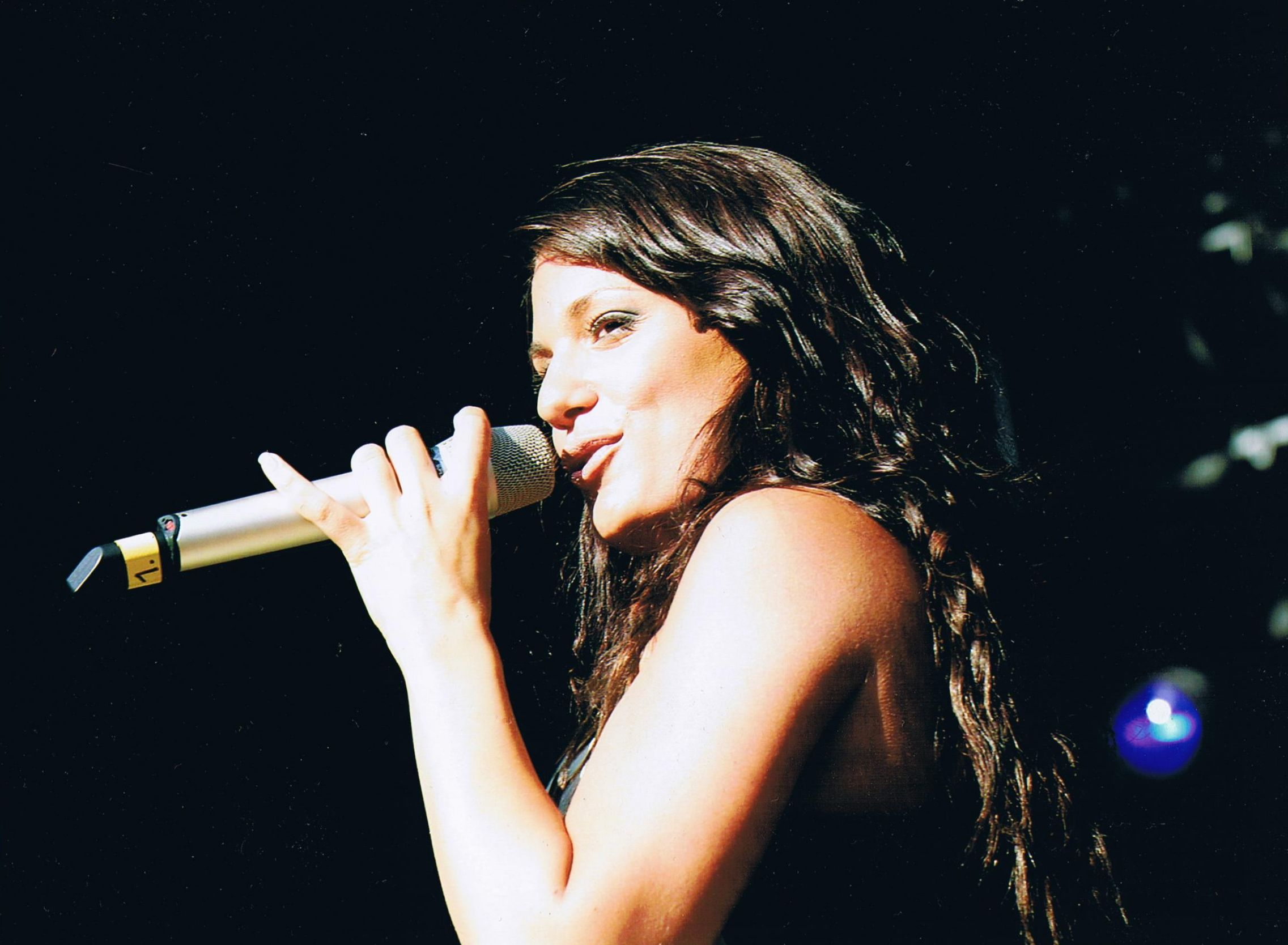 Maya Saban / Support Söhne Mannheims 10.08.2005